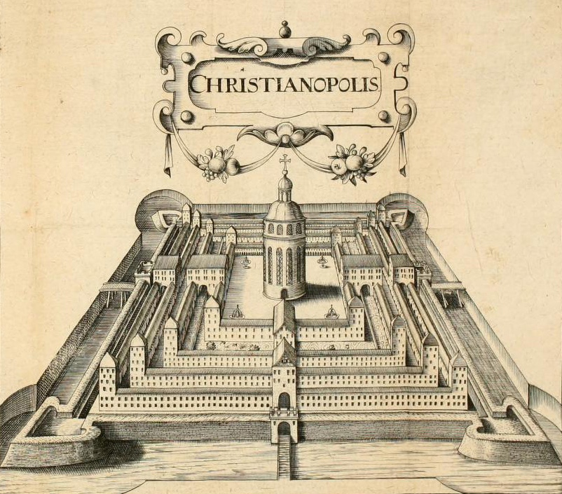 Visualisierung der Idealstadt Christianopolis aus Johann Valentin Andreaes Reipublicae Christianopolitanae descriptio. Argentorati 1619